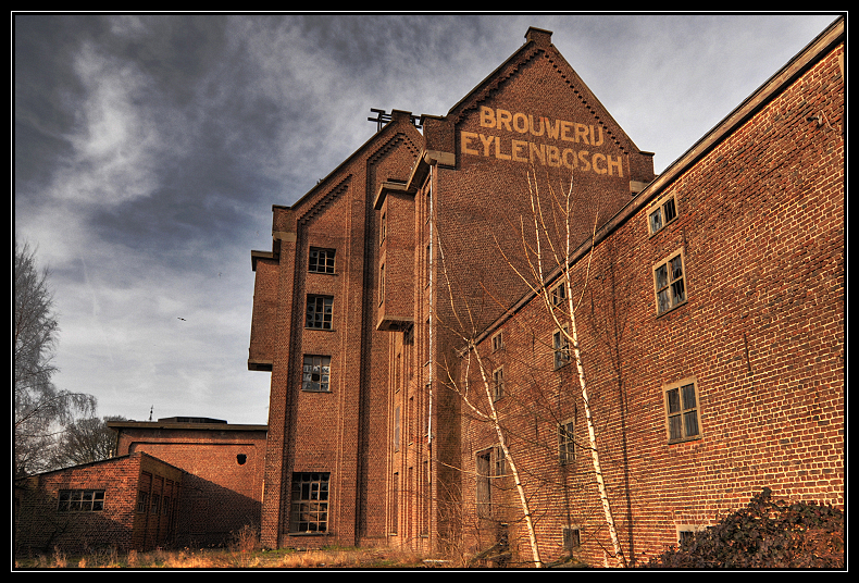 Brouwerij Eylenbosch te Schepdaal (Dilbeek)